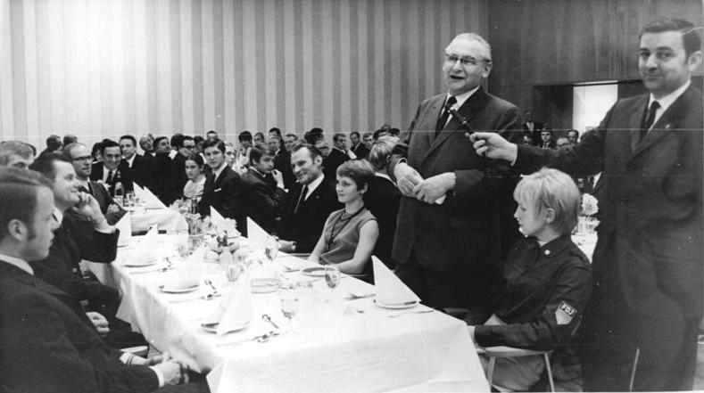 Zentralbild Katschorowski 16.11.1970-ill. Berlin: Am 16.11.70 fand im Hotel "Stadt Berlin" eine Aussprache zwischen der SED-Bezirksleitung, den Magistrat und der Nationalen Front mit Berliner Spitzensportlern statt. V.r.: Marina Janecke, Vizeuropameisterin im Turm- und Brettspringen, Paul Verner, 1. Sekretär der Bezirksleitung Berlin der SED, Karin Janz, Weltmeisterin im Stufenbarren, Rudi Hellmann, Leiter der Abteilung Sport, beim ZK der SED. 2.v.l.: Manfred Ewald, Präsident des DTSB.